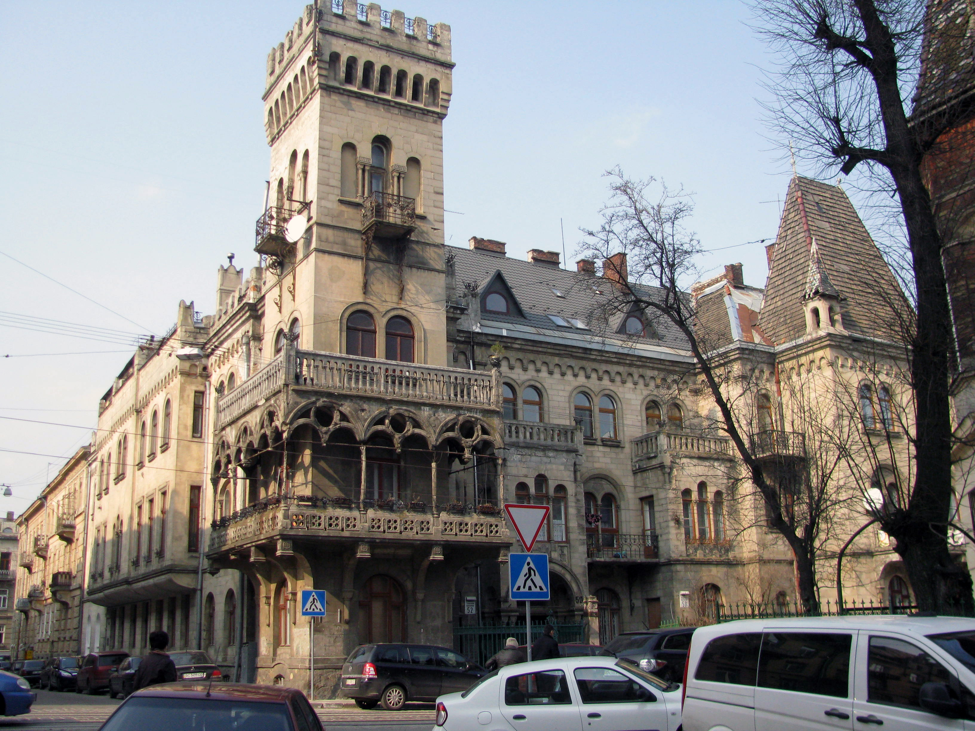 Будинок № 50-52 на вулиці Генерала Чупринки у Львові.